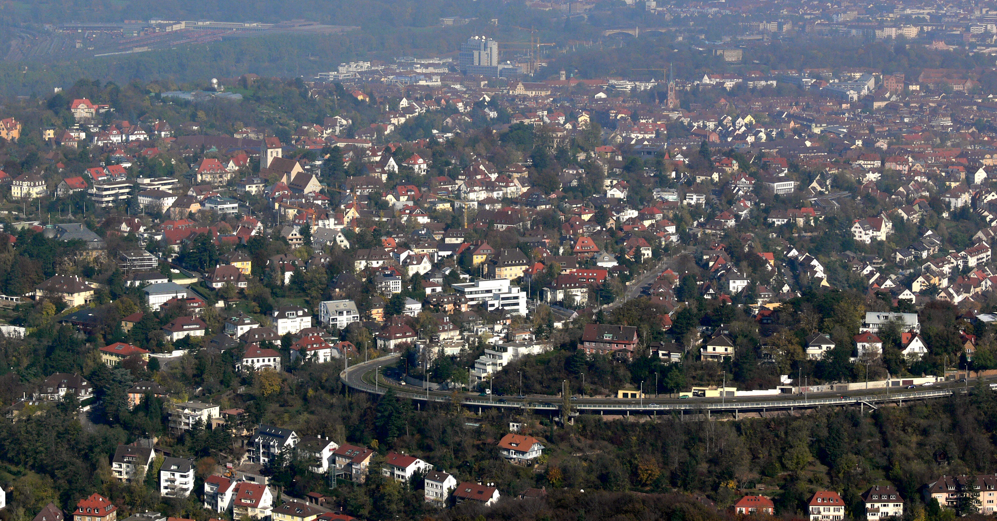 Stuttgart-Ost (mit Christuskirche), gesehen vom Fernsehturm